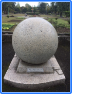 駿府公園内の石碑